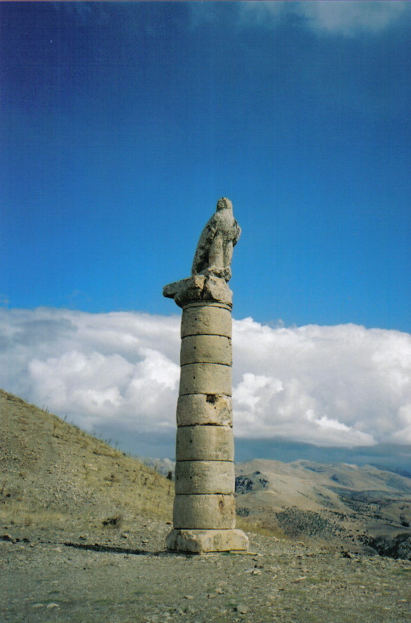 The monument of Karakuş Tümülüs, Nemrut Dağı National Park, (C) Gerry Lynch, 2003.